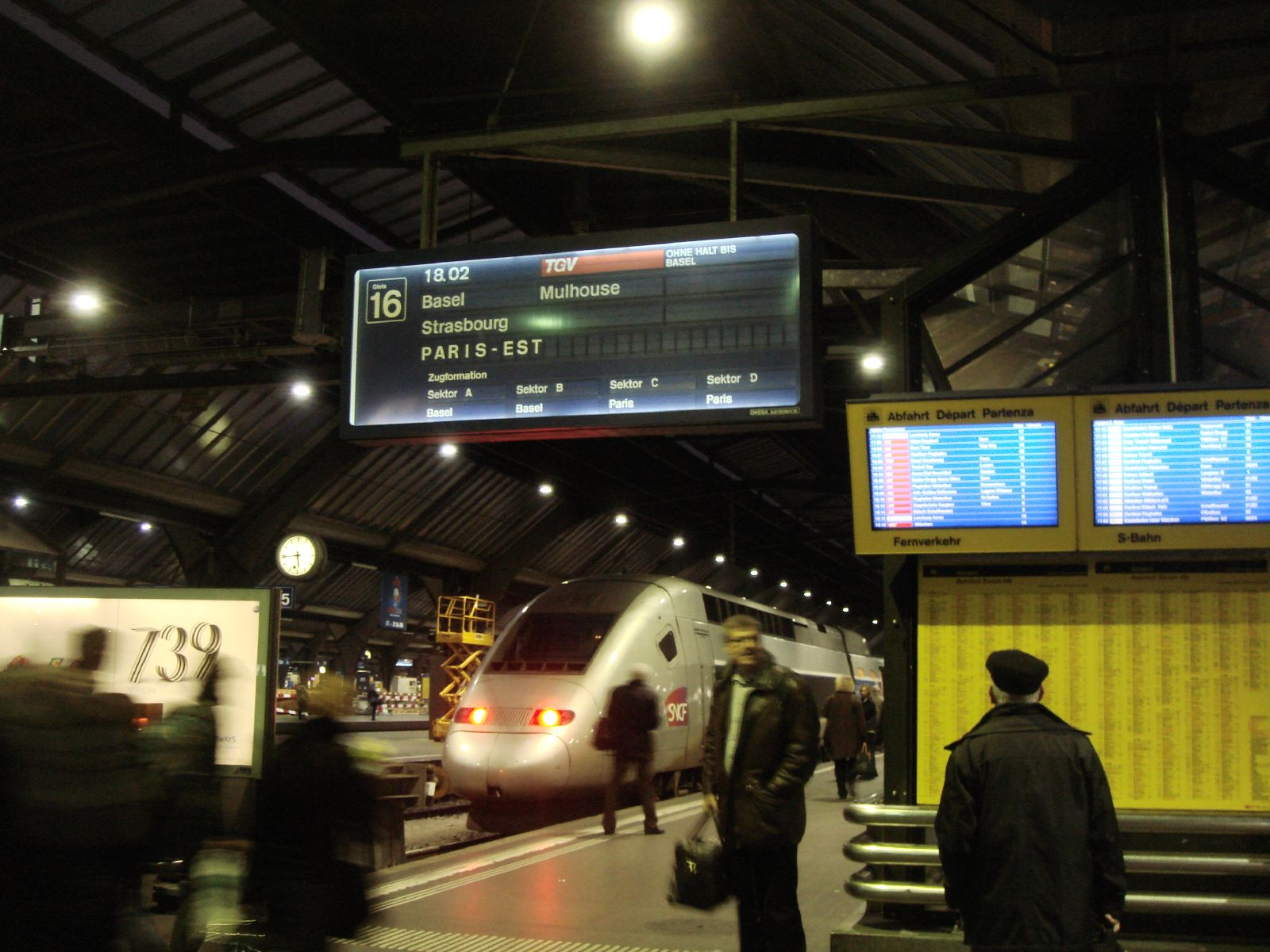 Ein TGV im Züricher Hauptbahnhof.